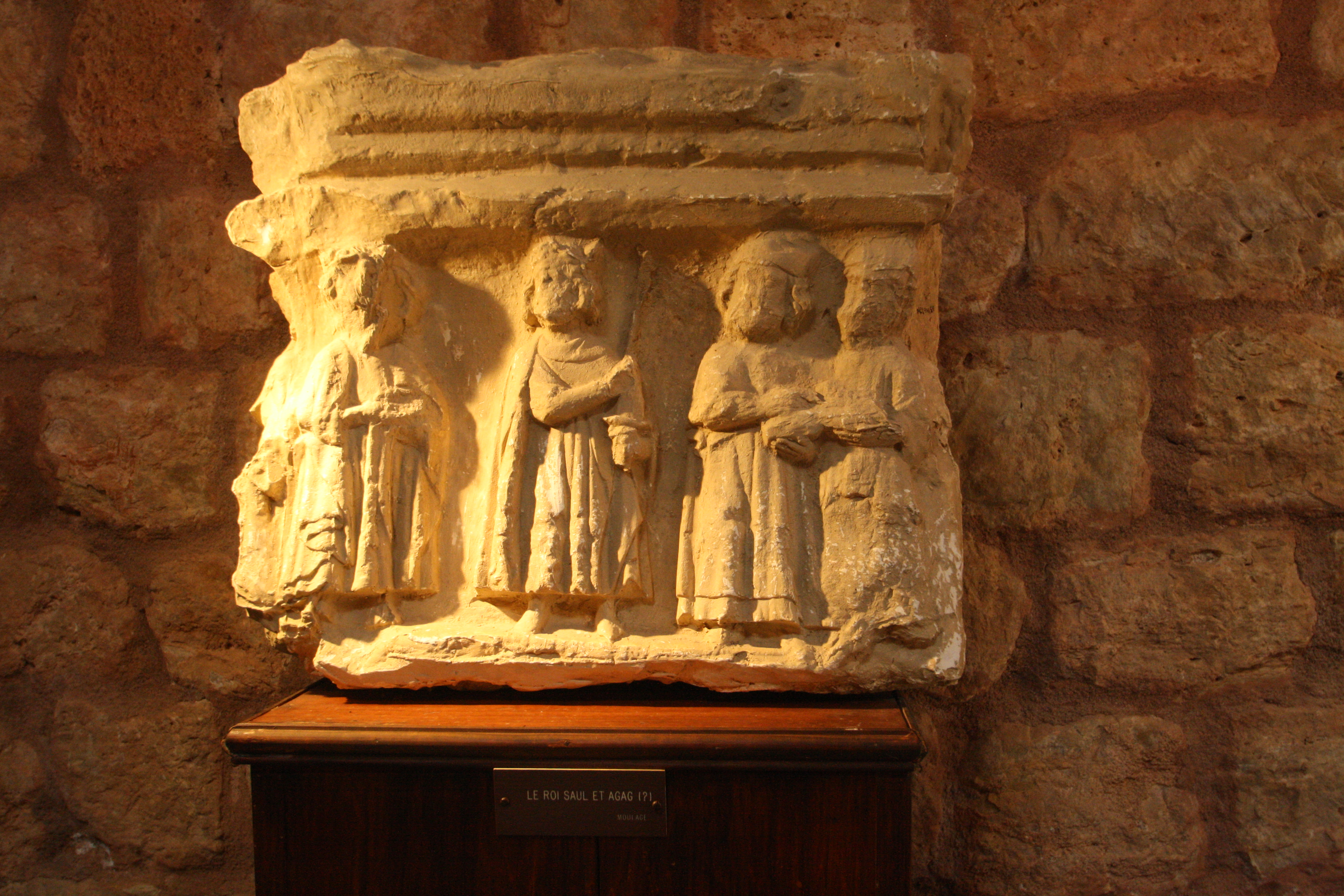 Cazedarnes (Hérault) - chapiteau : le roi Saül et Agag.